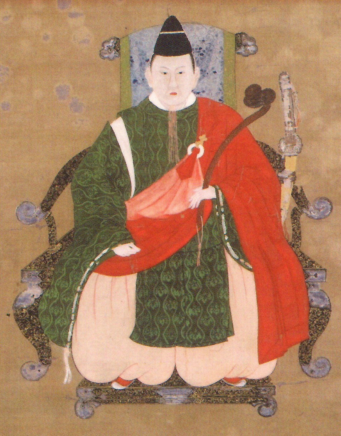 毛利綱元の肖像。